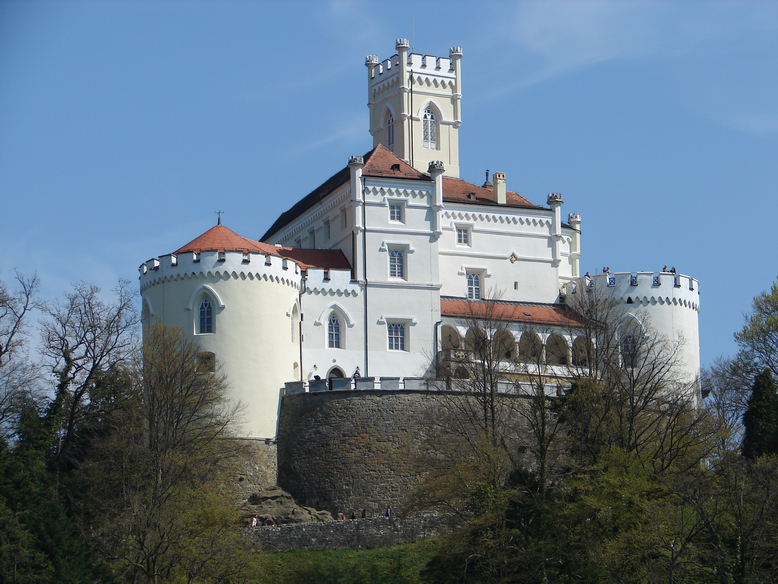 Dvorac Trakošćan